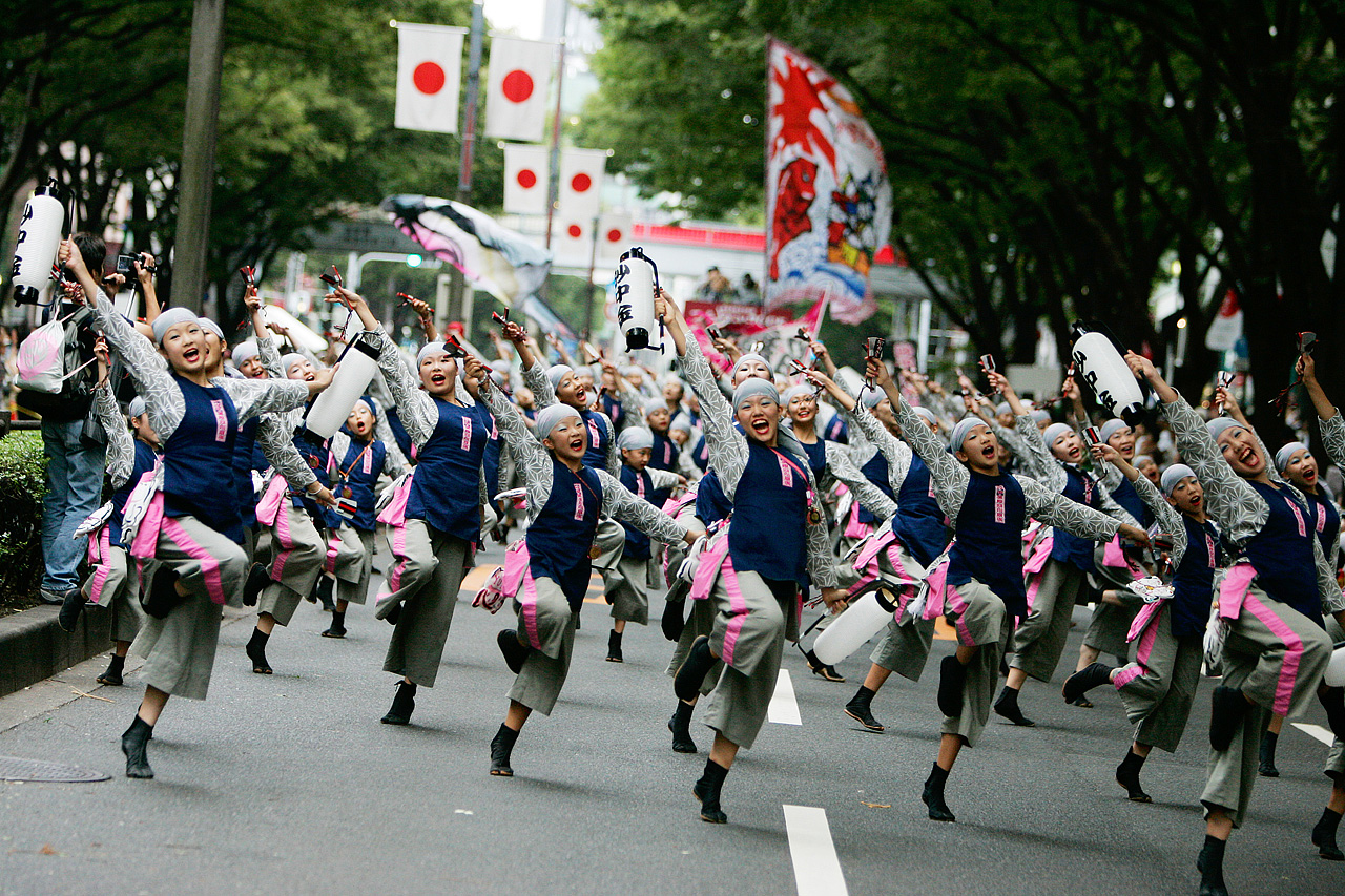 原宿スーパーよさこい2005